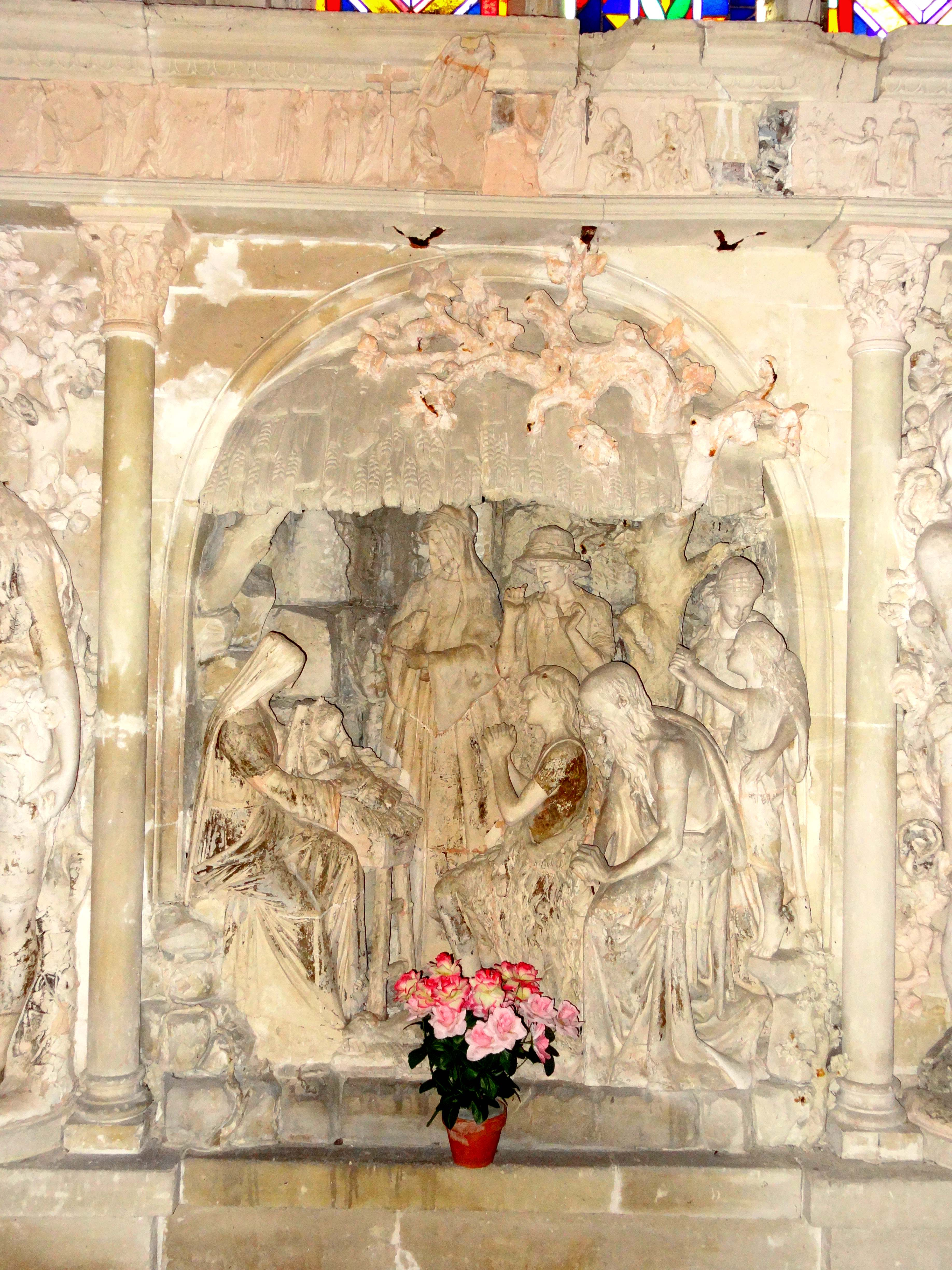 Mobilier de l'église - voir titre.